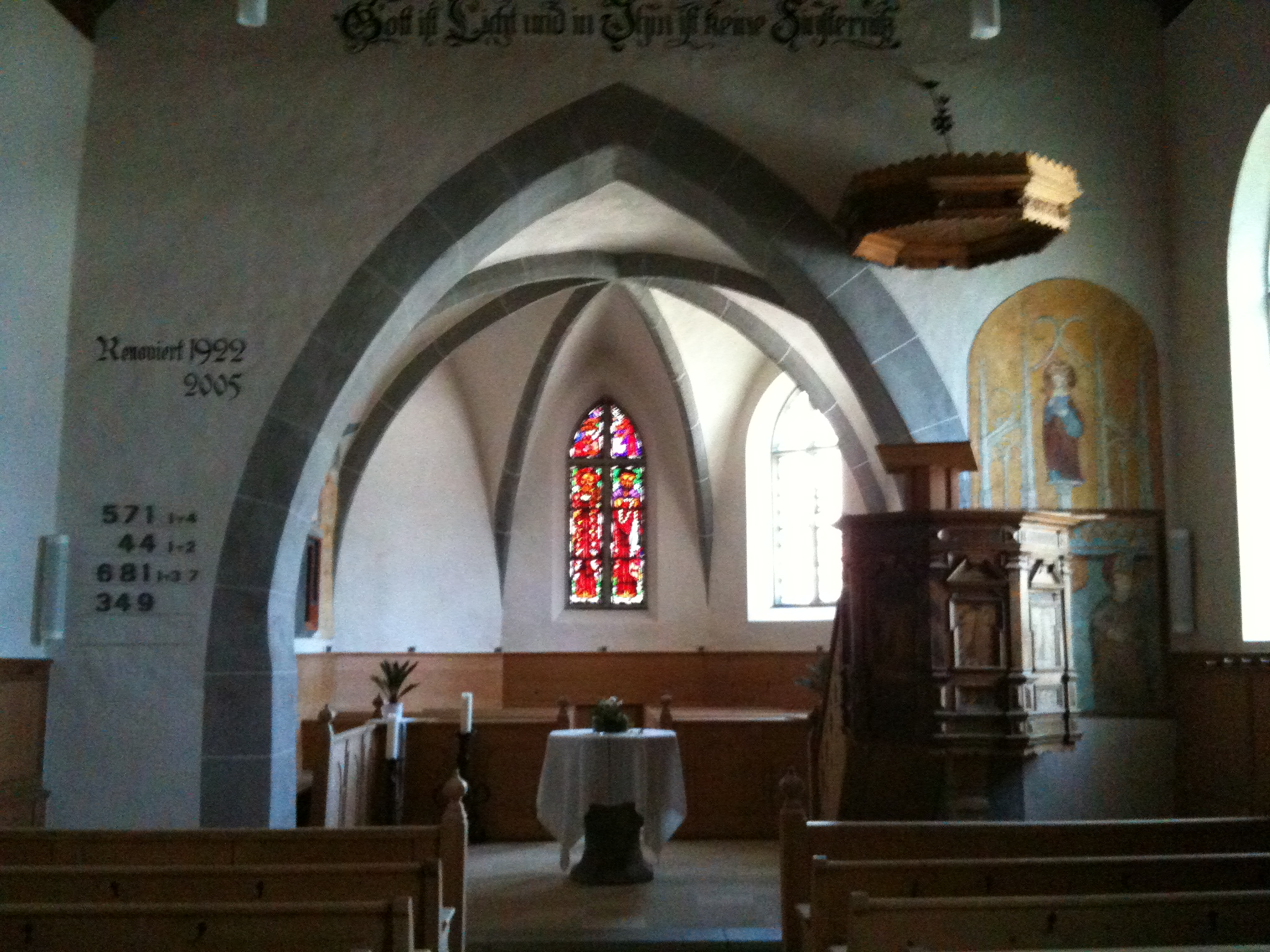 reformierte Kirche St. Peter im Schanfigg, Kanton Graubünden